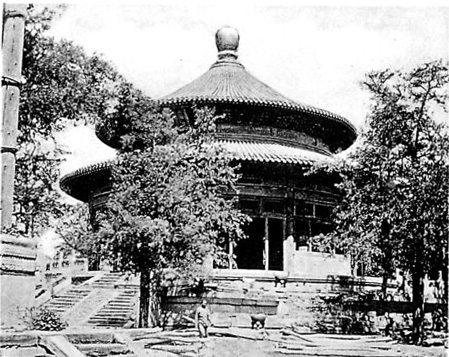 photo from Ein Tagebuch in Bildern